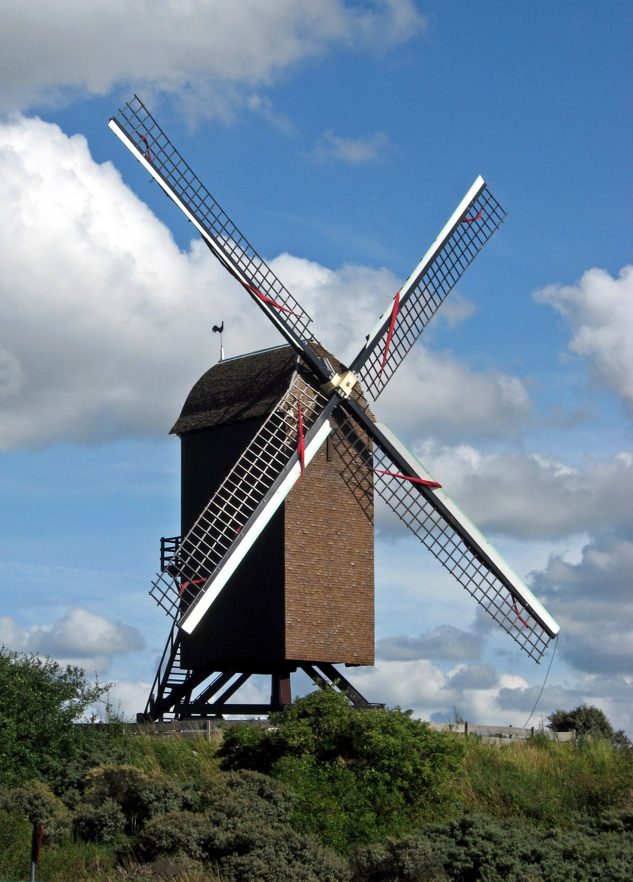 Zu besichtigende Windmühle Koksijde